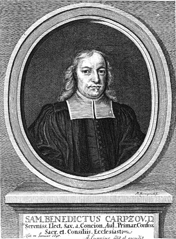 Samuel Benedict Carpzov (1607-1657) war ein deutscher evangelischer Theologe